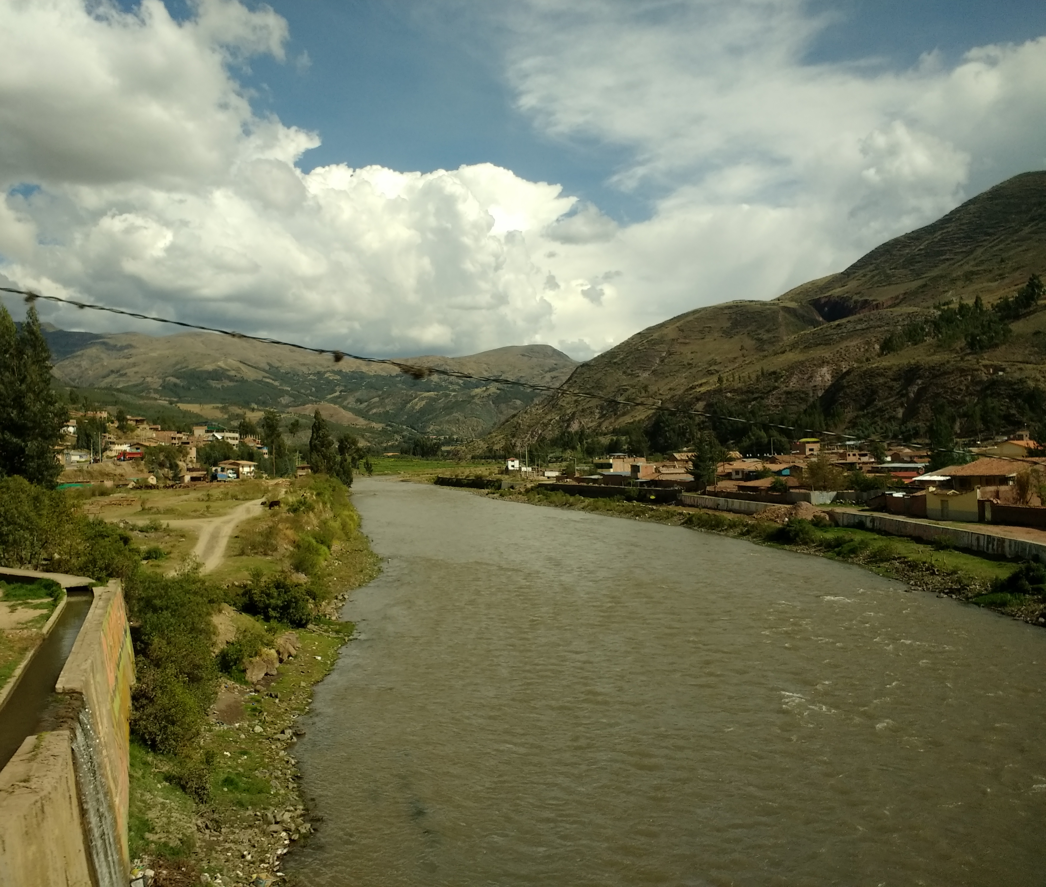 Río Urubamba cerca de Urcos, Perú.